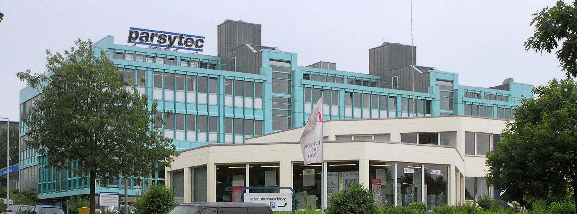 Aachen, Gebäude der Firma Parsytec auf der Hüls (davor liegt leider Büromaschinen Keller)